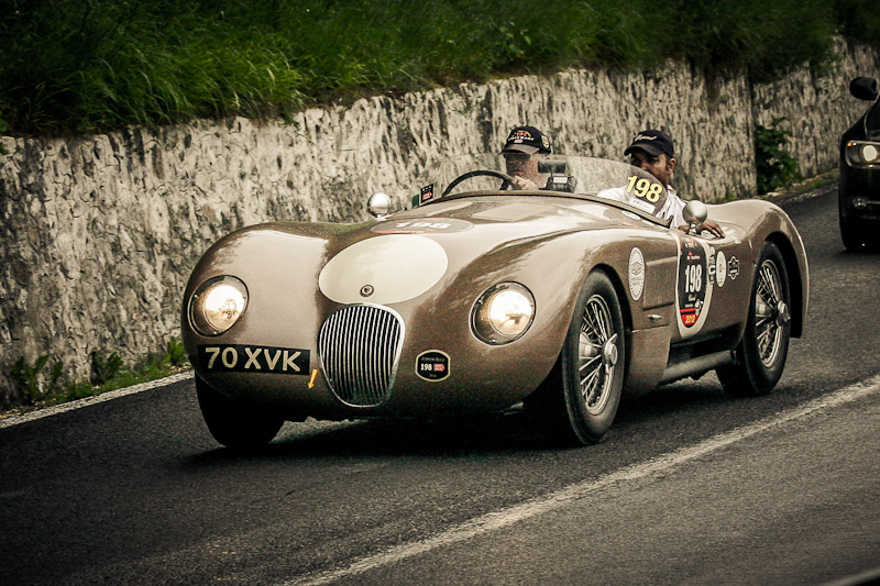 1000 miglia 2012 - SS della Futa . Pianoro (BO)